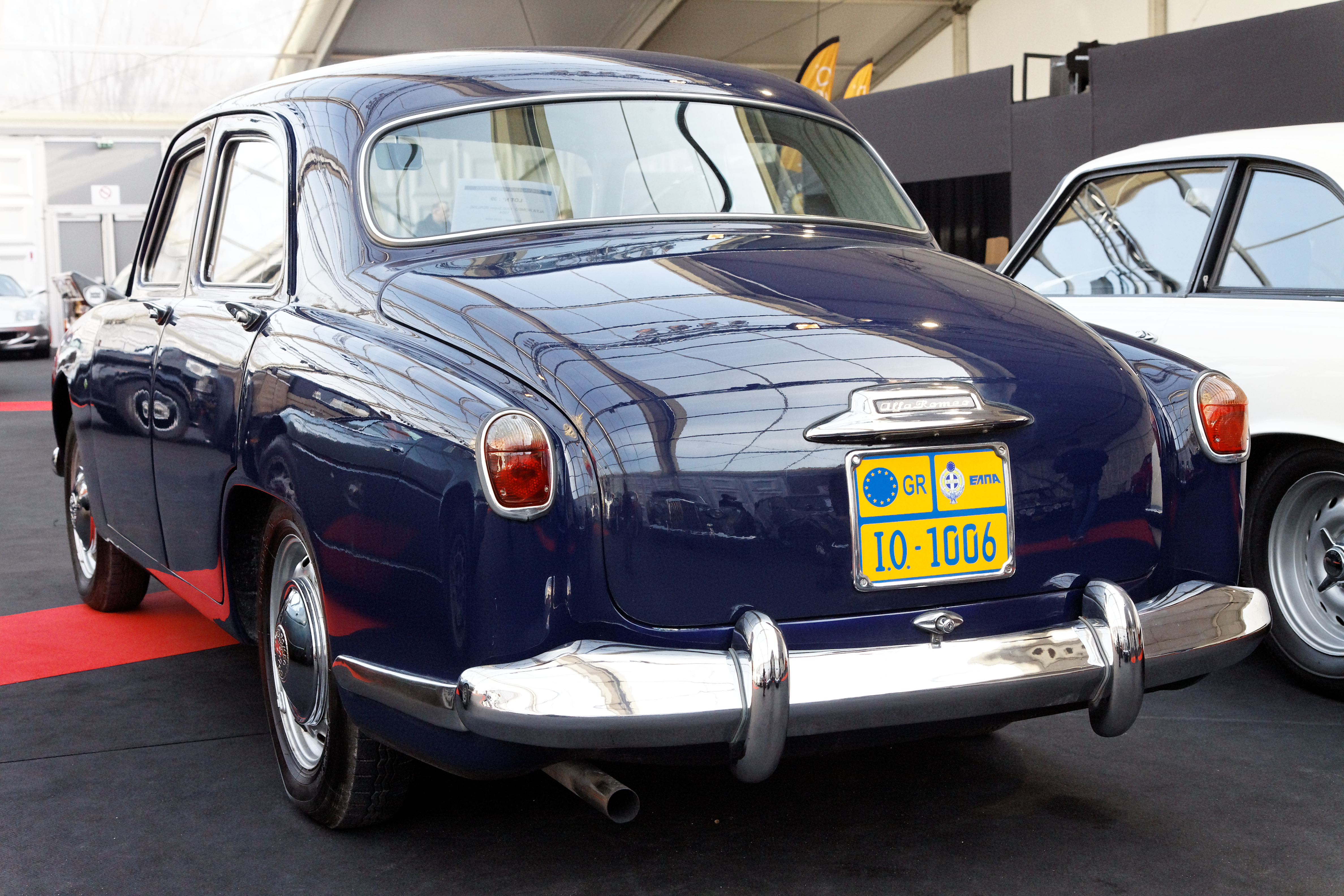 Alfa Romeo 1900 Super Berline - Festival Automobile International 2011 - Vente aux enchères